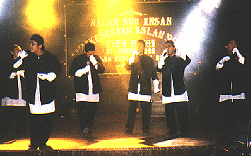 Adams membuat persembahan